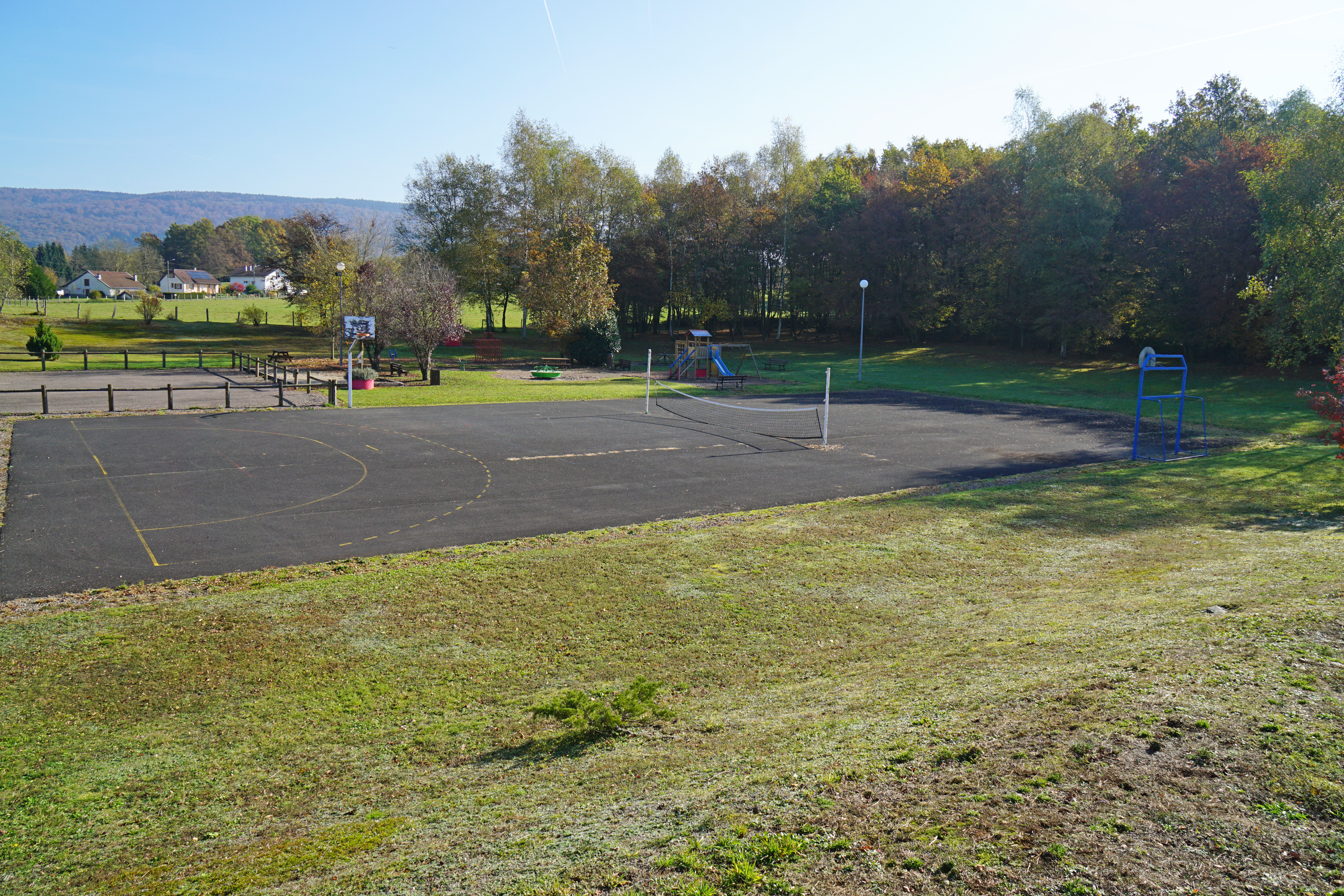 La zone de loisir de Montessaux.